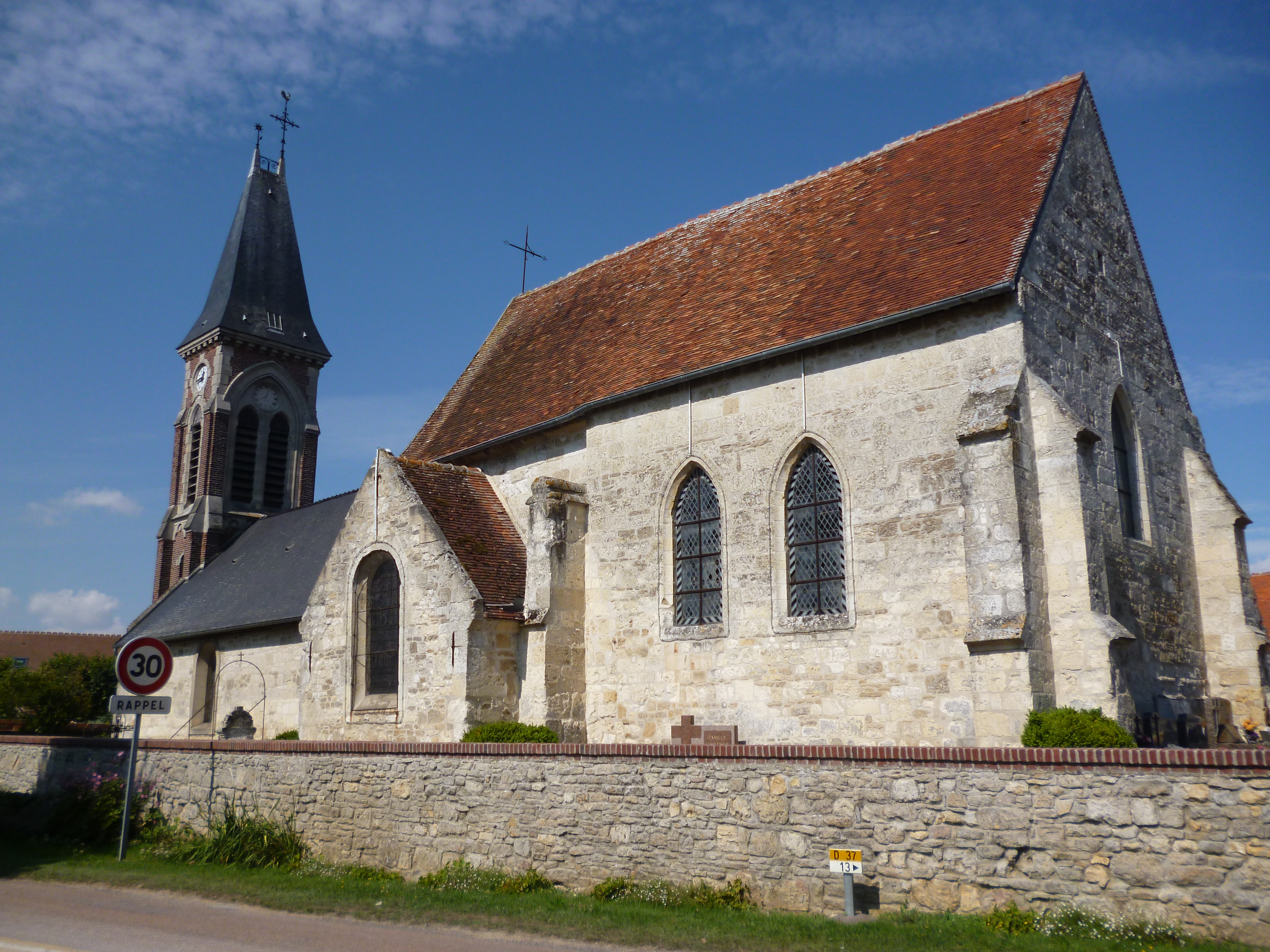 L'église Saint-Martin de Cressonsacq, située sur la commune de Cressonsacq (Oise, Picardie). Inscrite MH 1949.